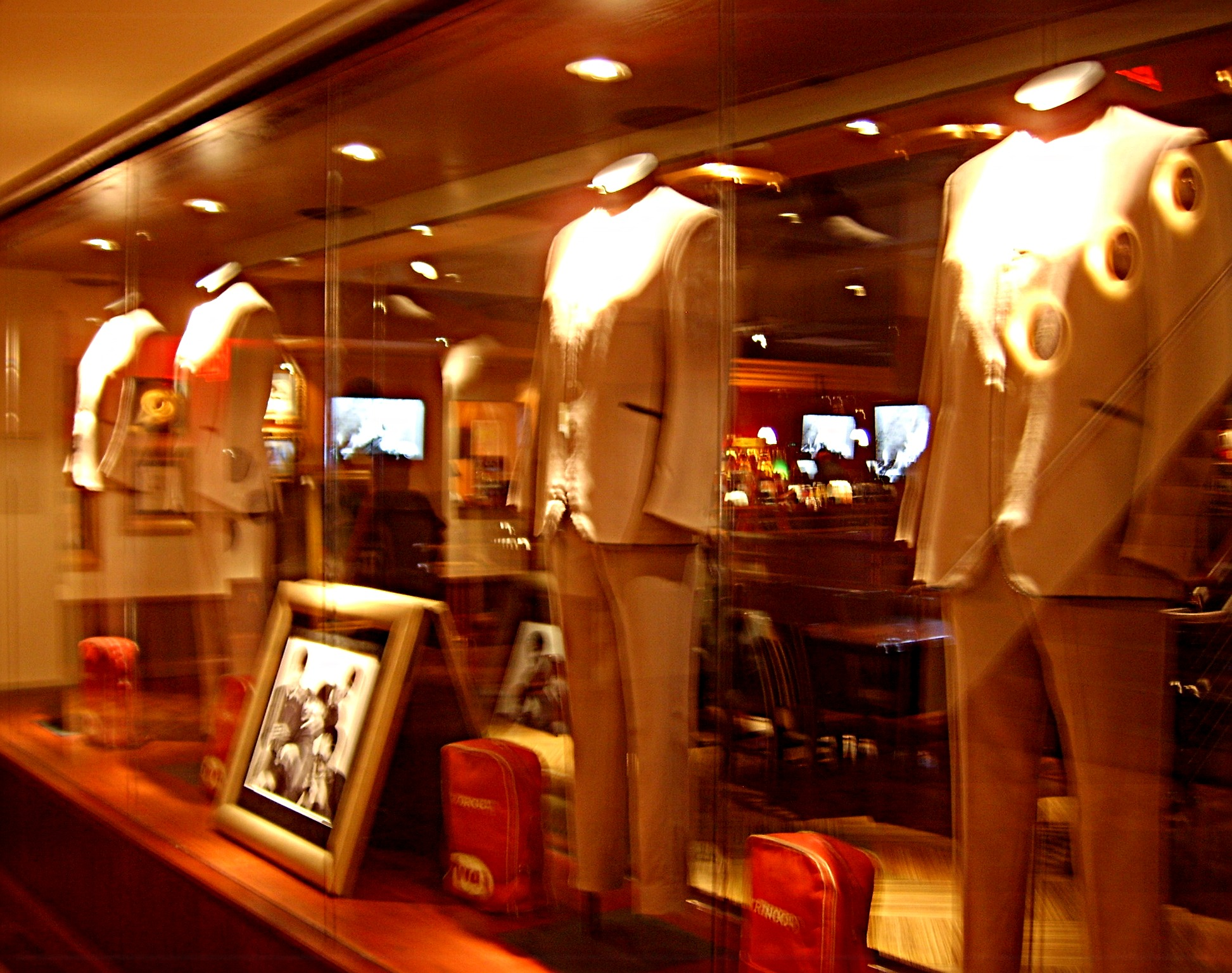 Original Anzüge der Beatles. 2005 im neuen HardRock-Café in NYC.